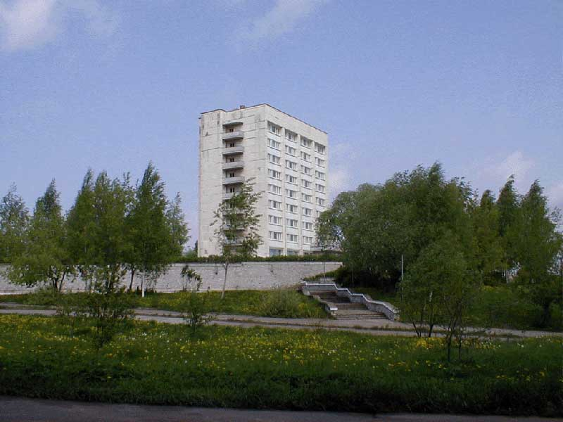 гостиница "Двуречье" (Кирово-Чепецк)